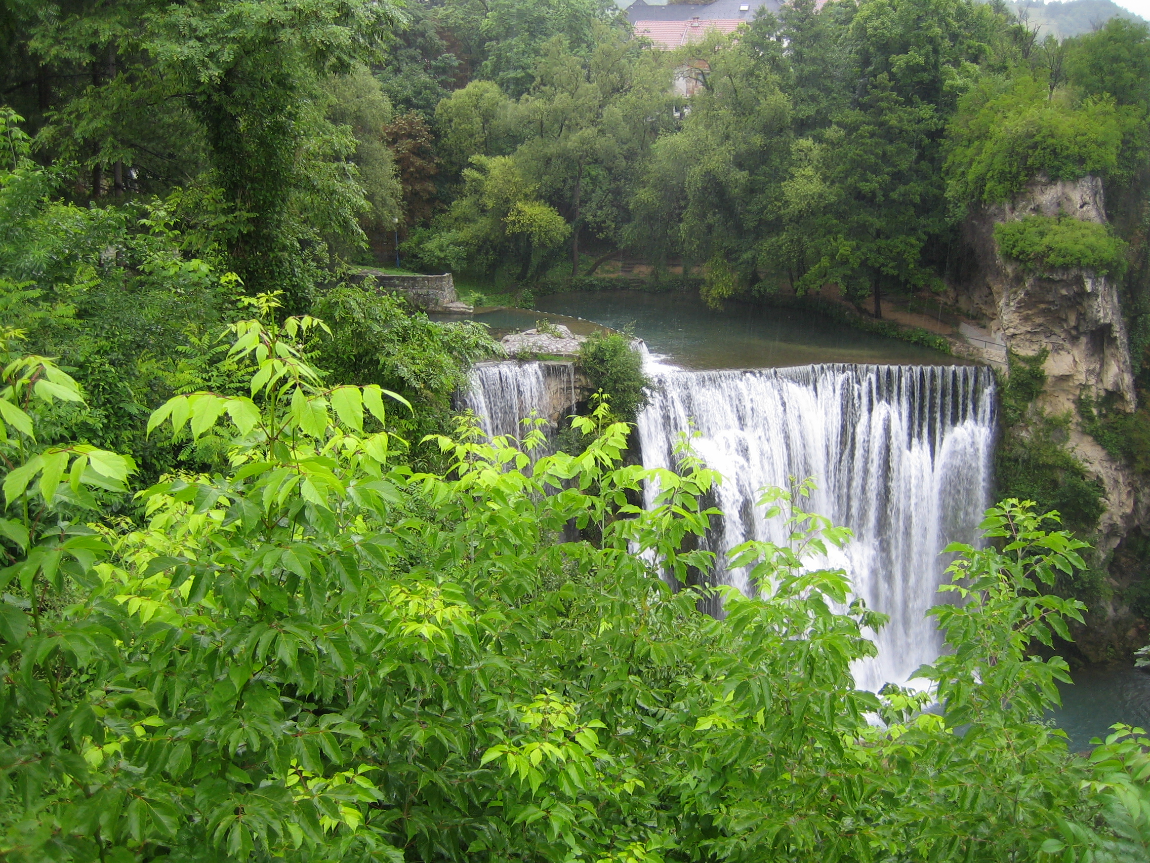 Taget av mig när jag var och hälsade på förra sommaren.